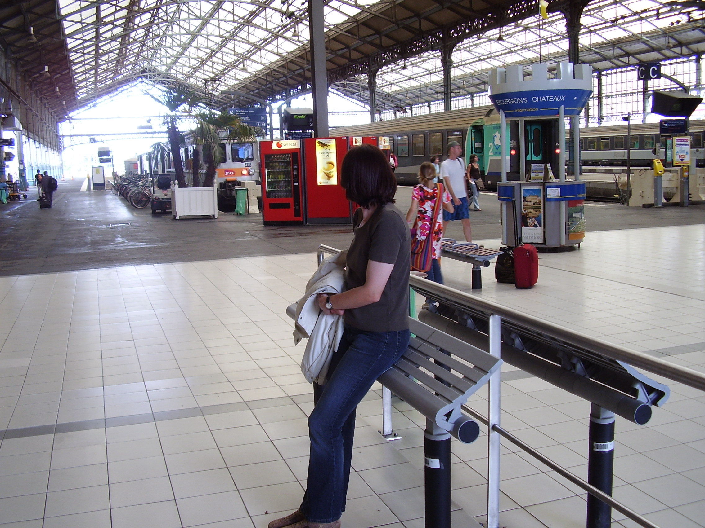 Tours, France